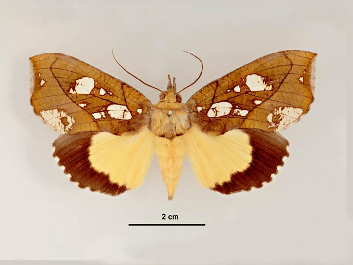 Eudocima cocalus female, dorsal view